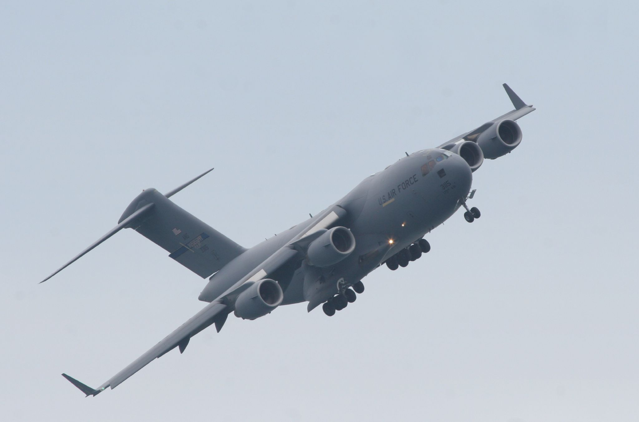 Un C-17 Globemaster